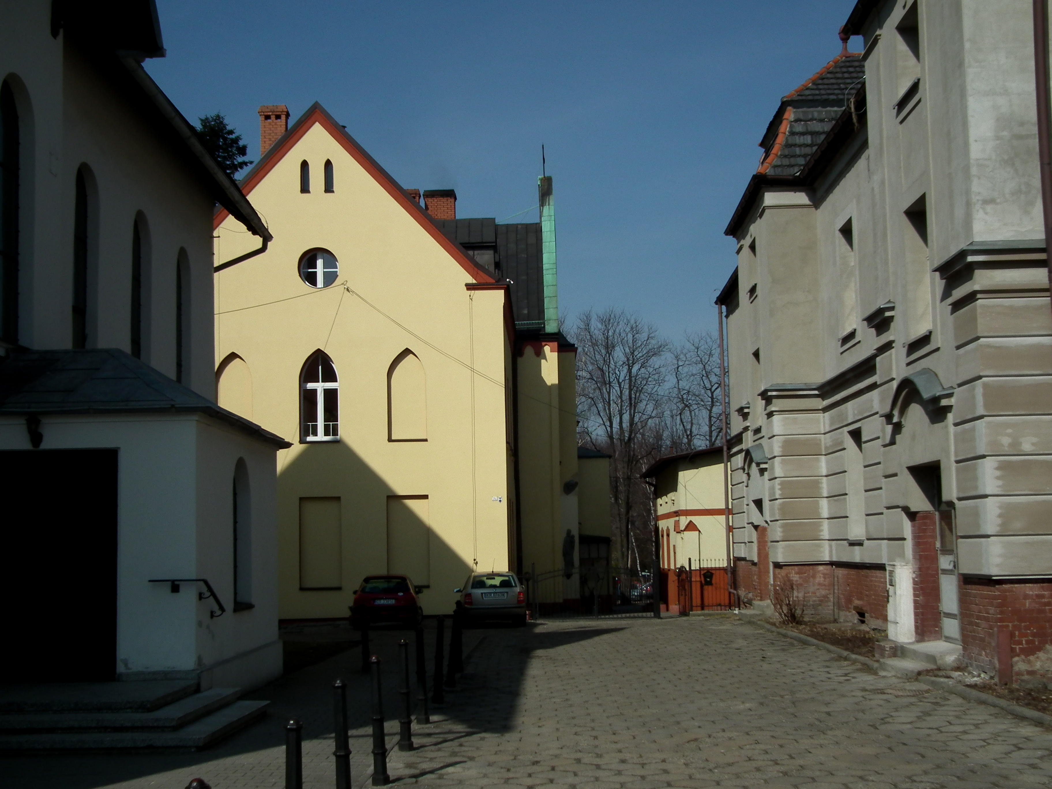 Zespół klasztorny ss. Boromeuszek